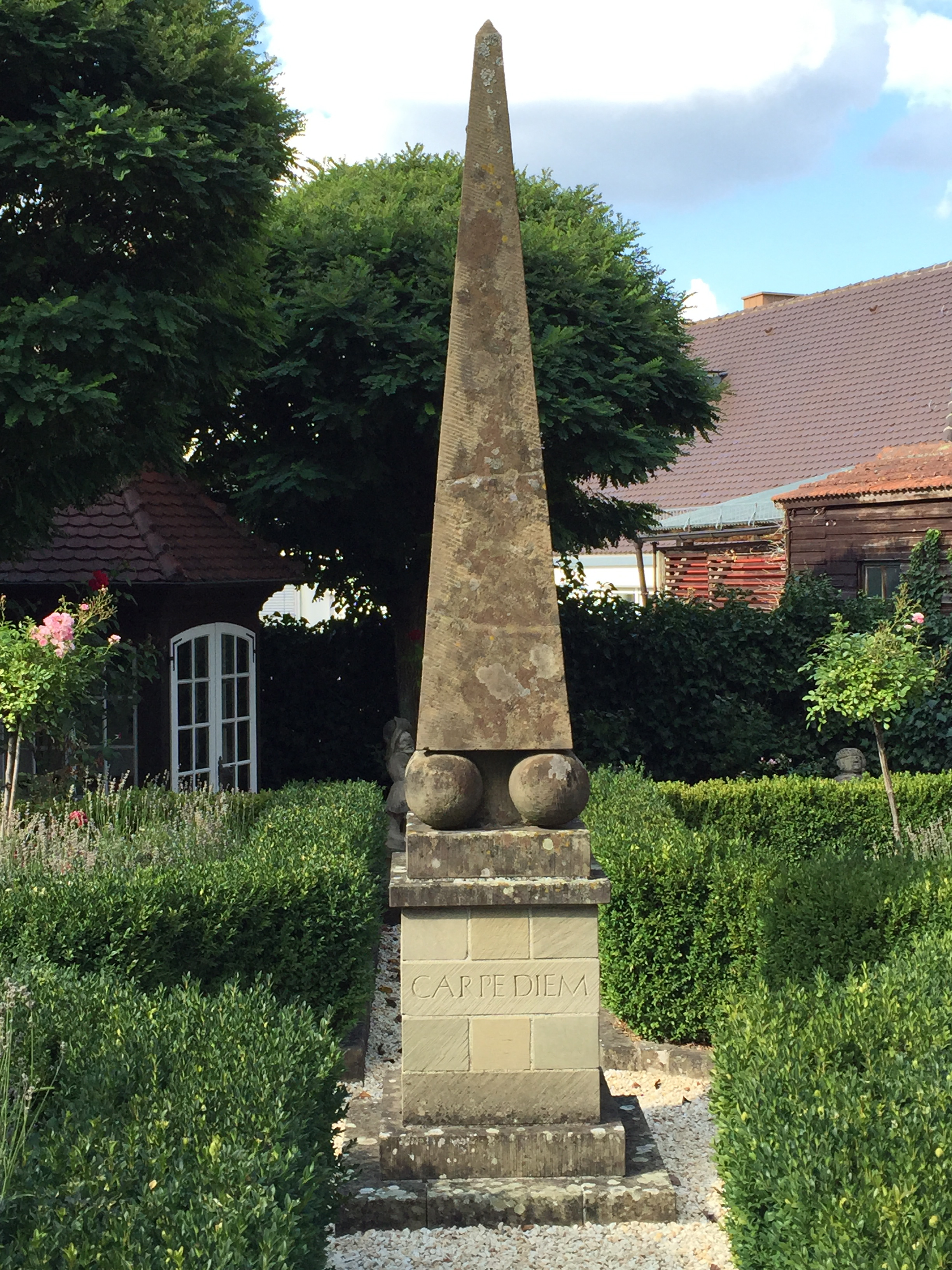 "Carpe diem" inscriptio Ellwangae invenita